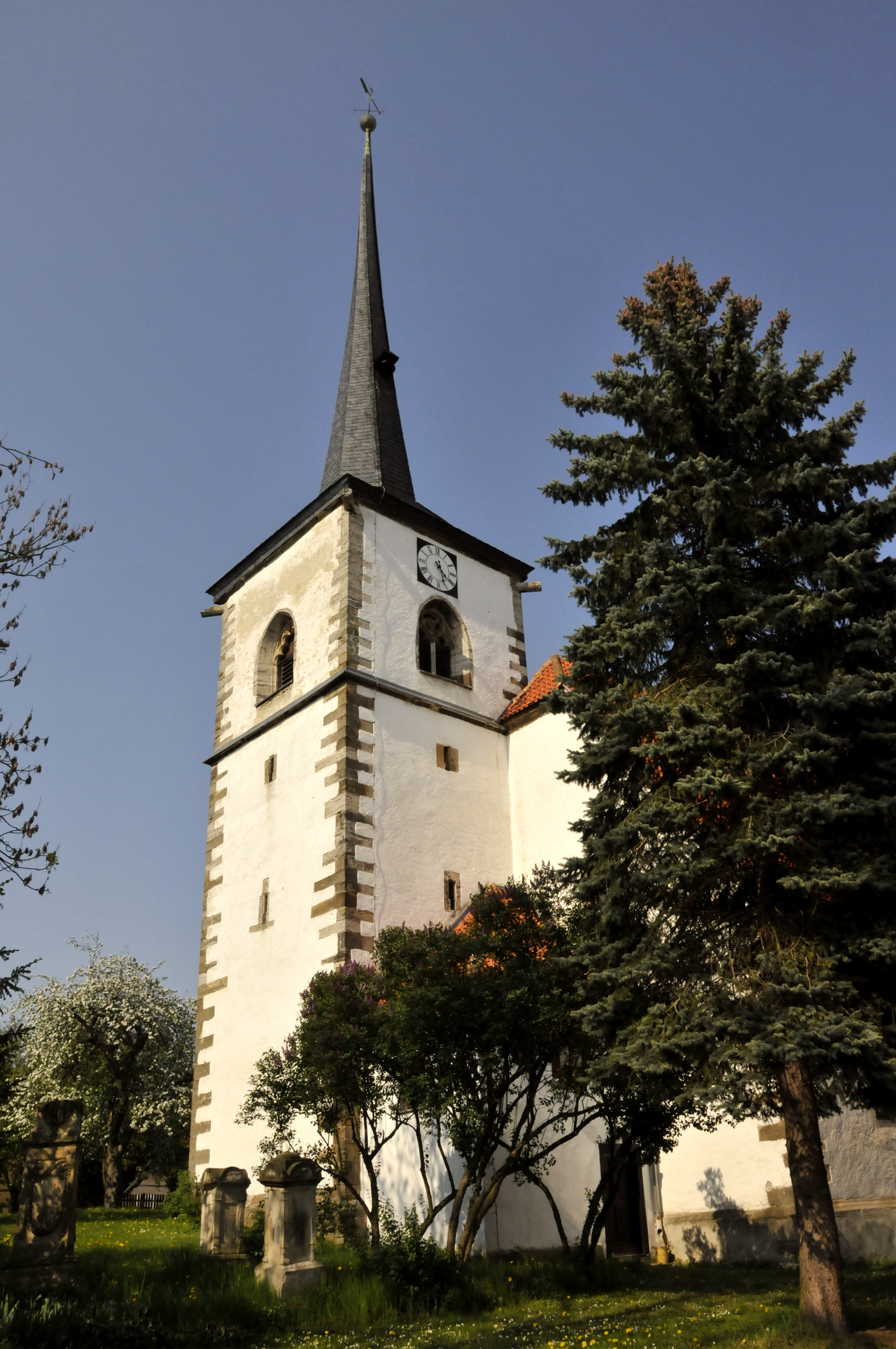 Ballstädt, Kirche